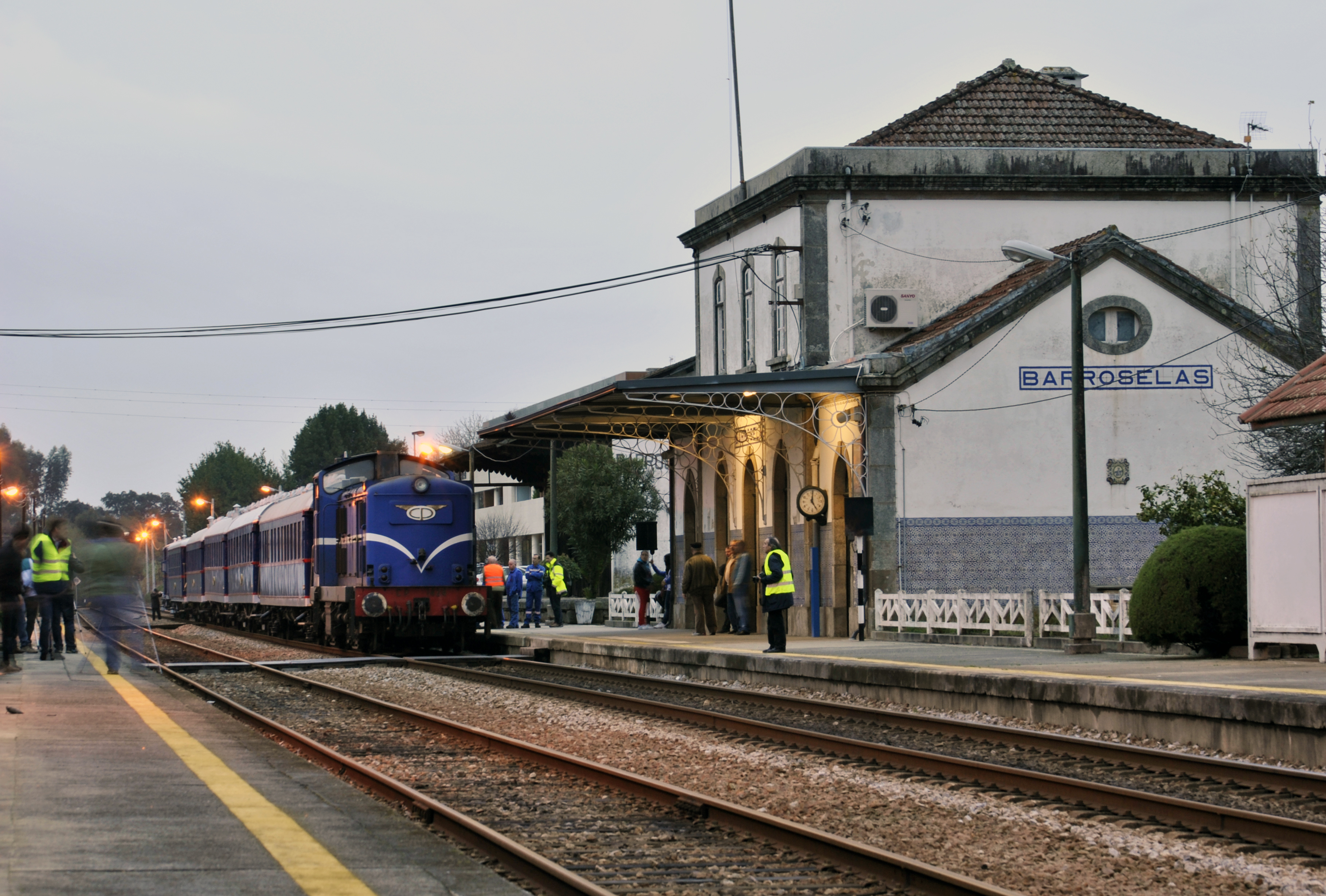 O comboio Presidencial com a 1424 aguarda na estação de Barroselas enquanto que a 1973 com o INT Tuy - Gaia não desimpede a via em Tamel devido a uma avaria